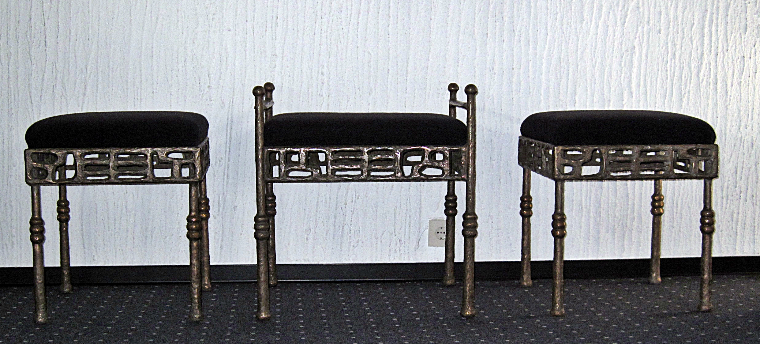 Brilon, Krankenhaus, Kapelle, Sedilien